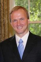 Andrejs Pildegovičs